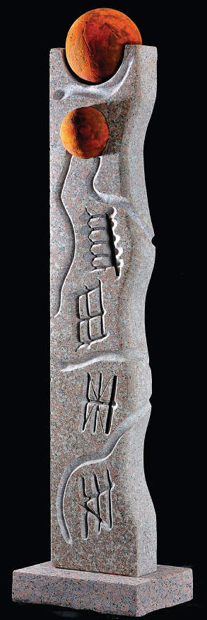 No name